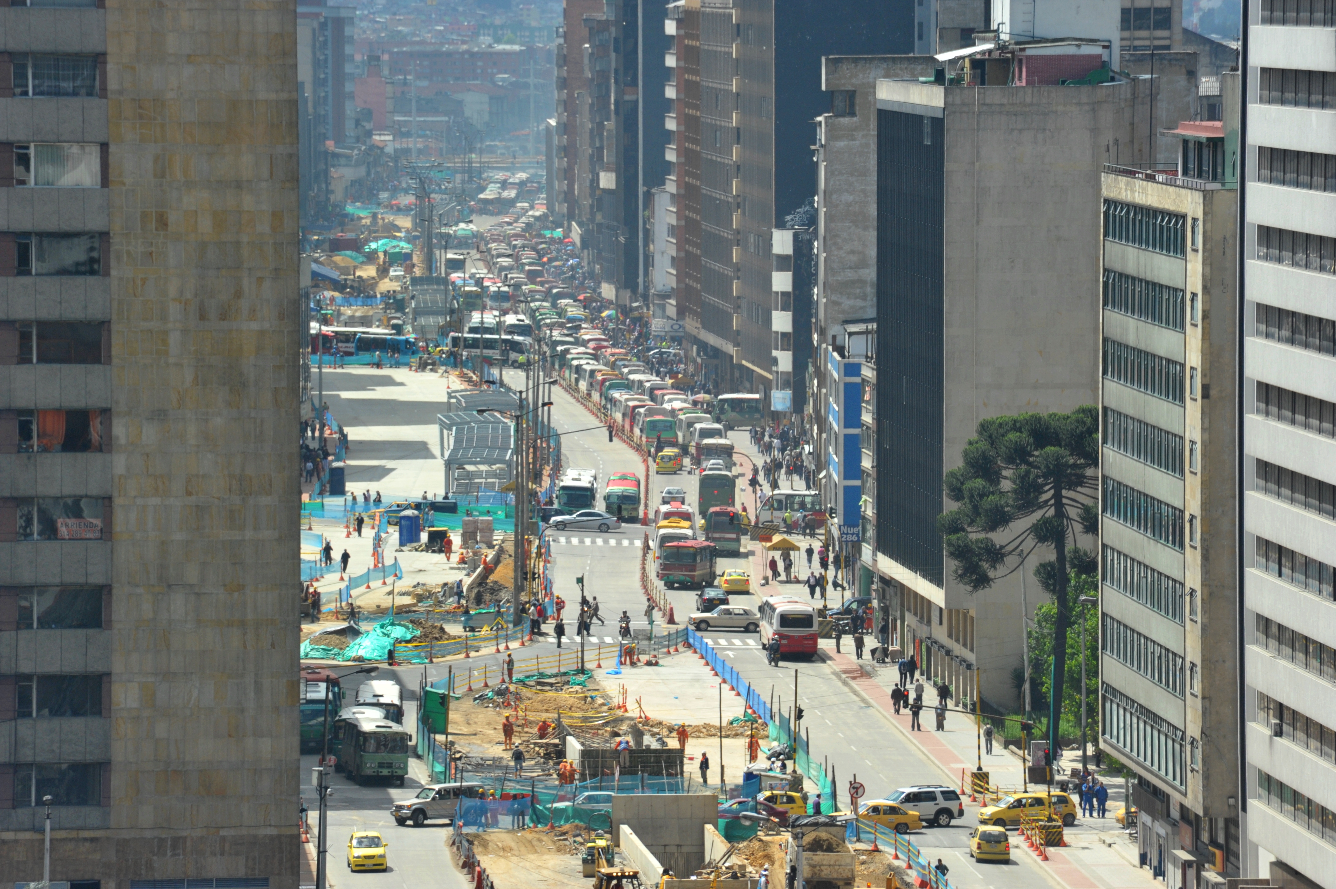 Carrera Décima hacia el sur. El edificio de la izquierda es el Residencias Colón, y el de la derecha la Corporación Financiera del Valle.